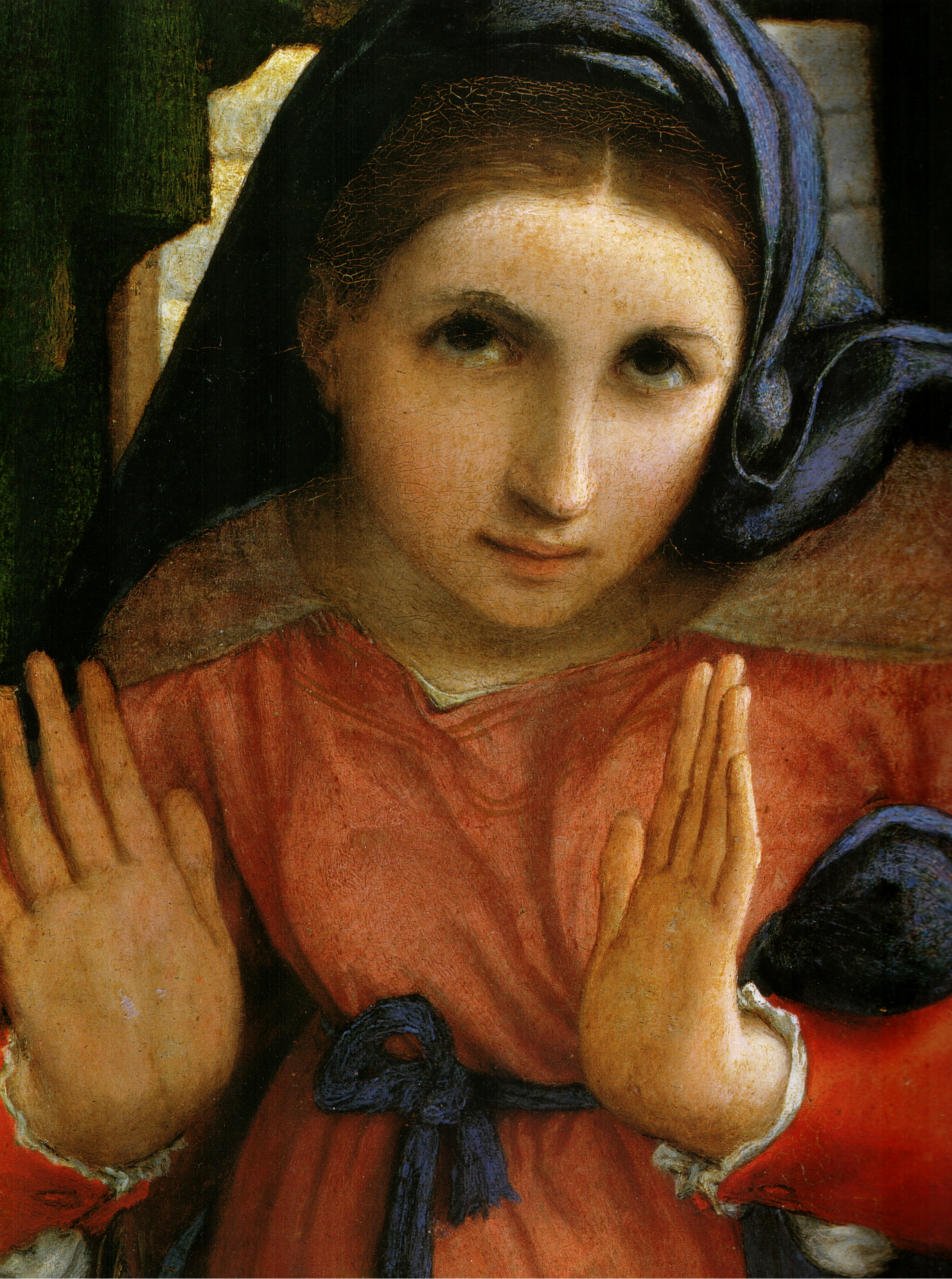 detail